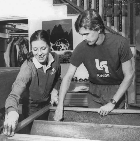 1983 PRESS PHOTO OLYMPIC PENTATHLETE BOB NIEMAN AND SUSAN NIEMAN